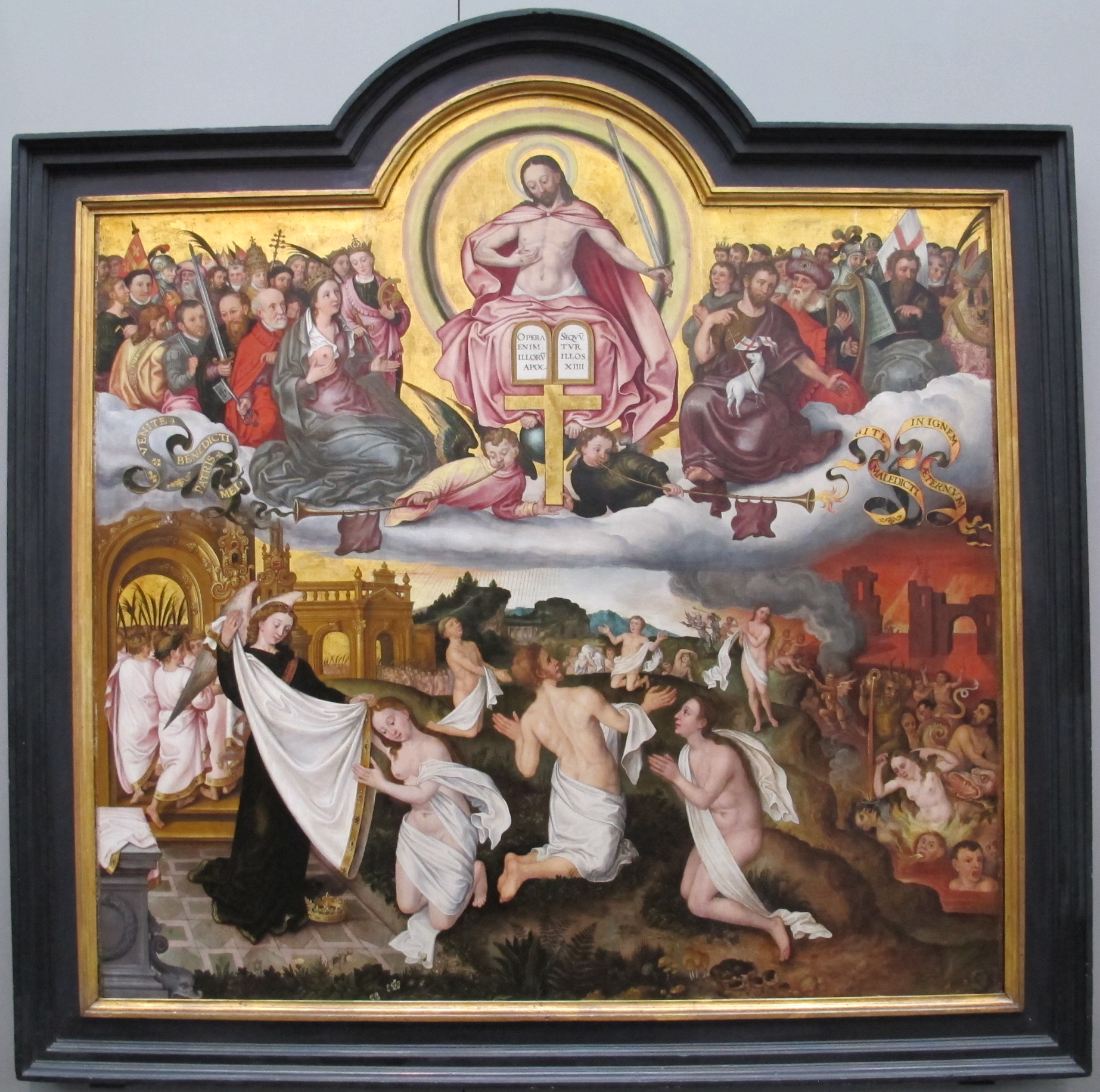 Jacques van den coornhuuse, giudizio universale, 1578